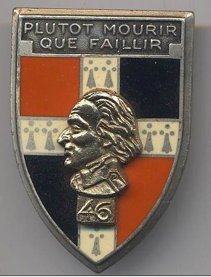 Emblème et devise du Régiment de Bretagne, devenu le 46 ème régiment d'Infanterie. Devise de la famille de Kermoysan.